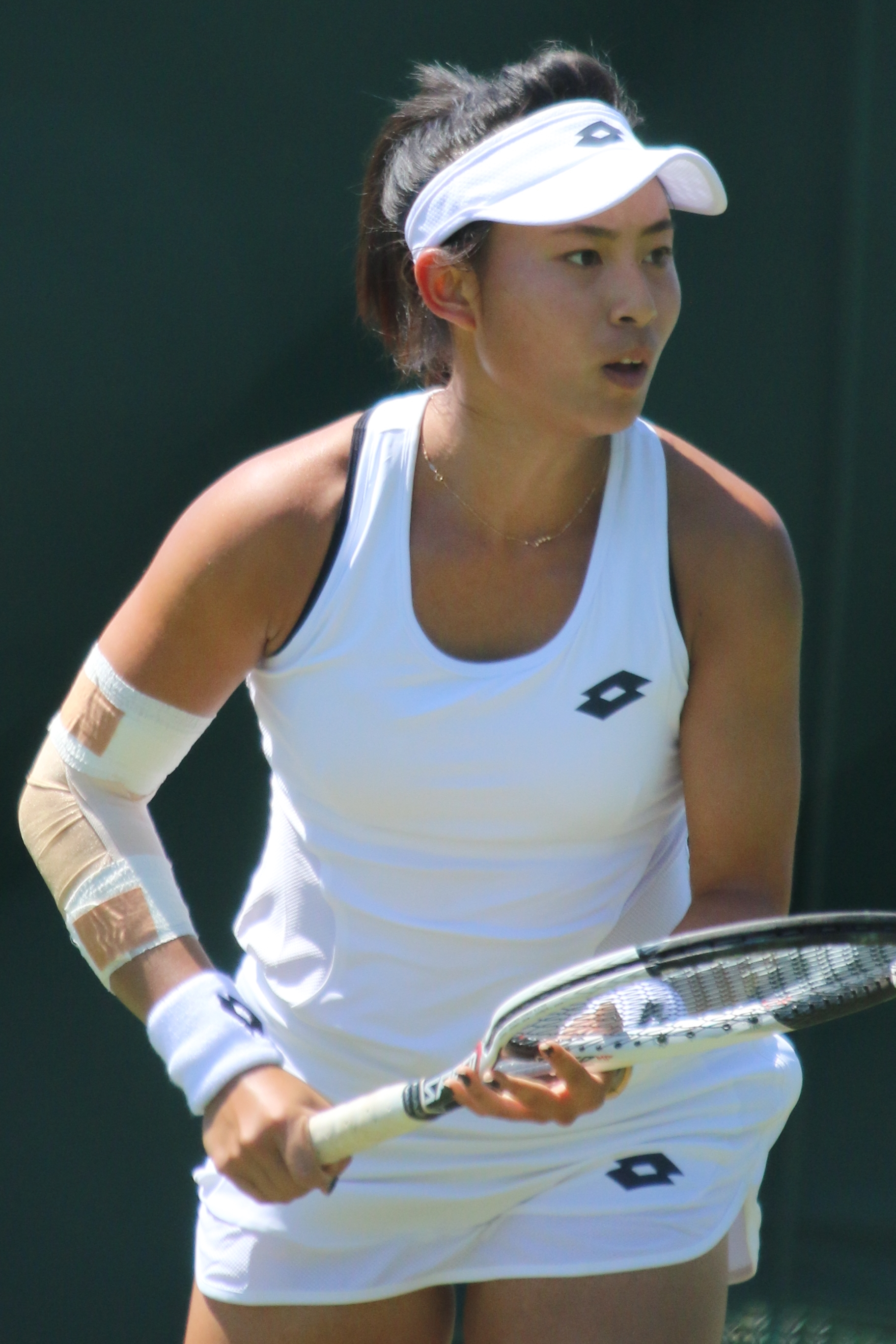 Zhao WMQ18 (17)